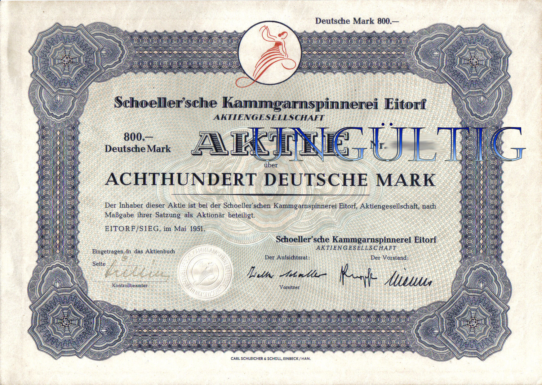 Aktie Schoeller´sche Kammgarnspinnerei Eitorf